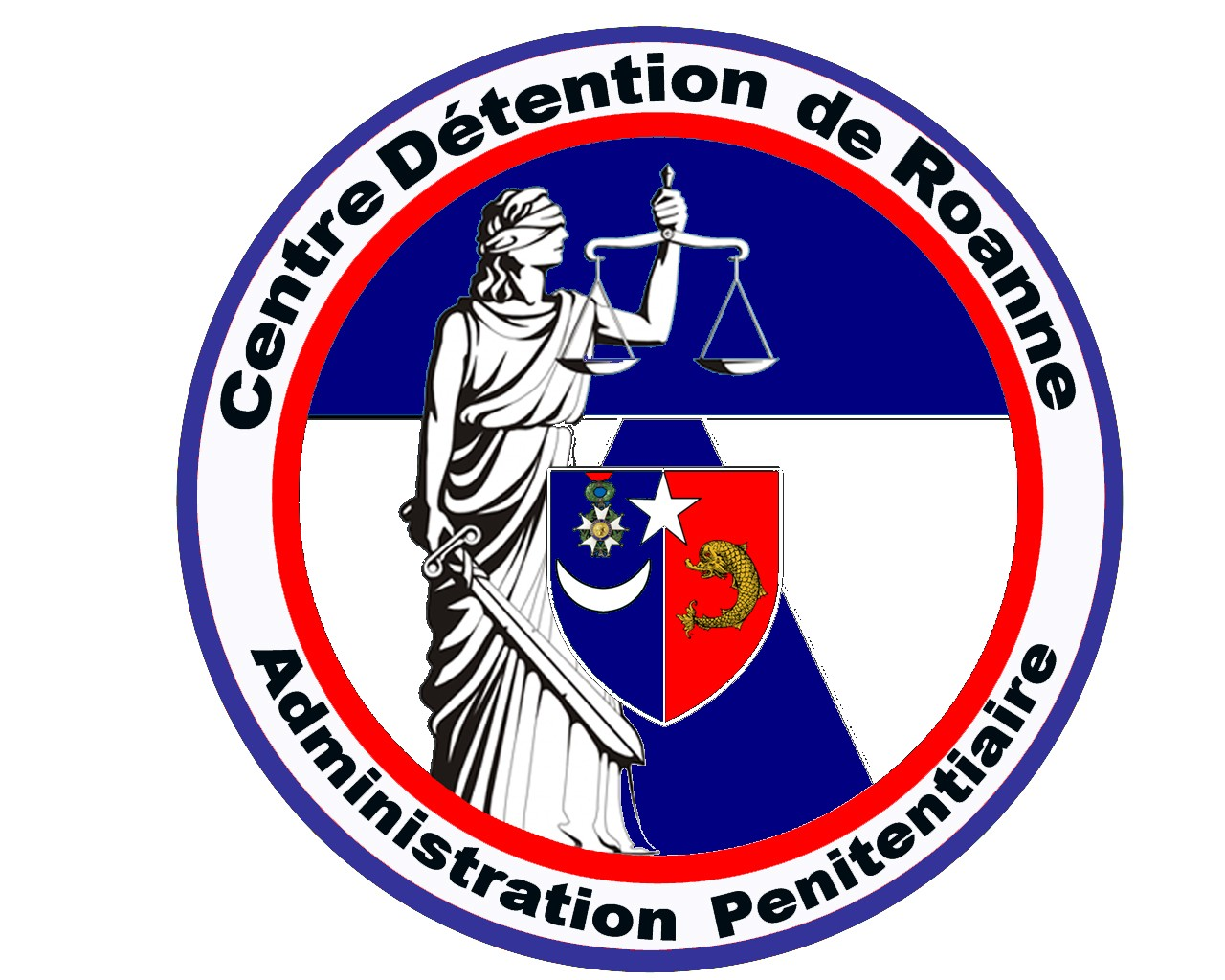 Administration pénitentiaire française. Ecusson du centre de détention de Roanne. Il est porté sur la tenue d'uniforme sur le bras gauche.